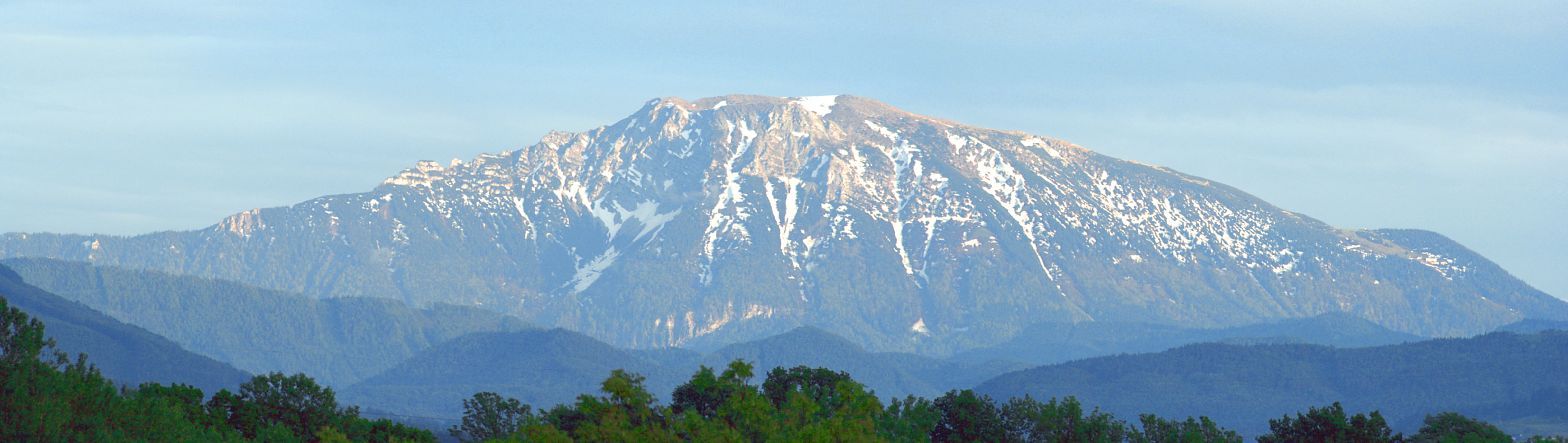 The Ötscher as seen from the Erlauftal